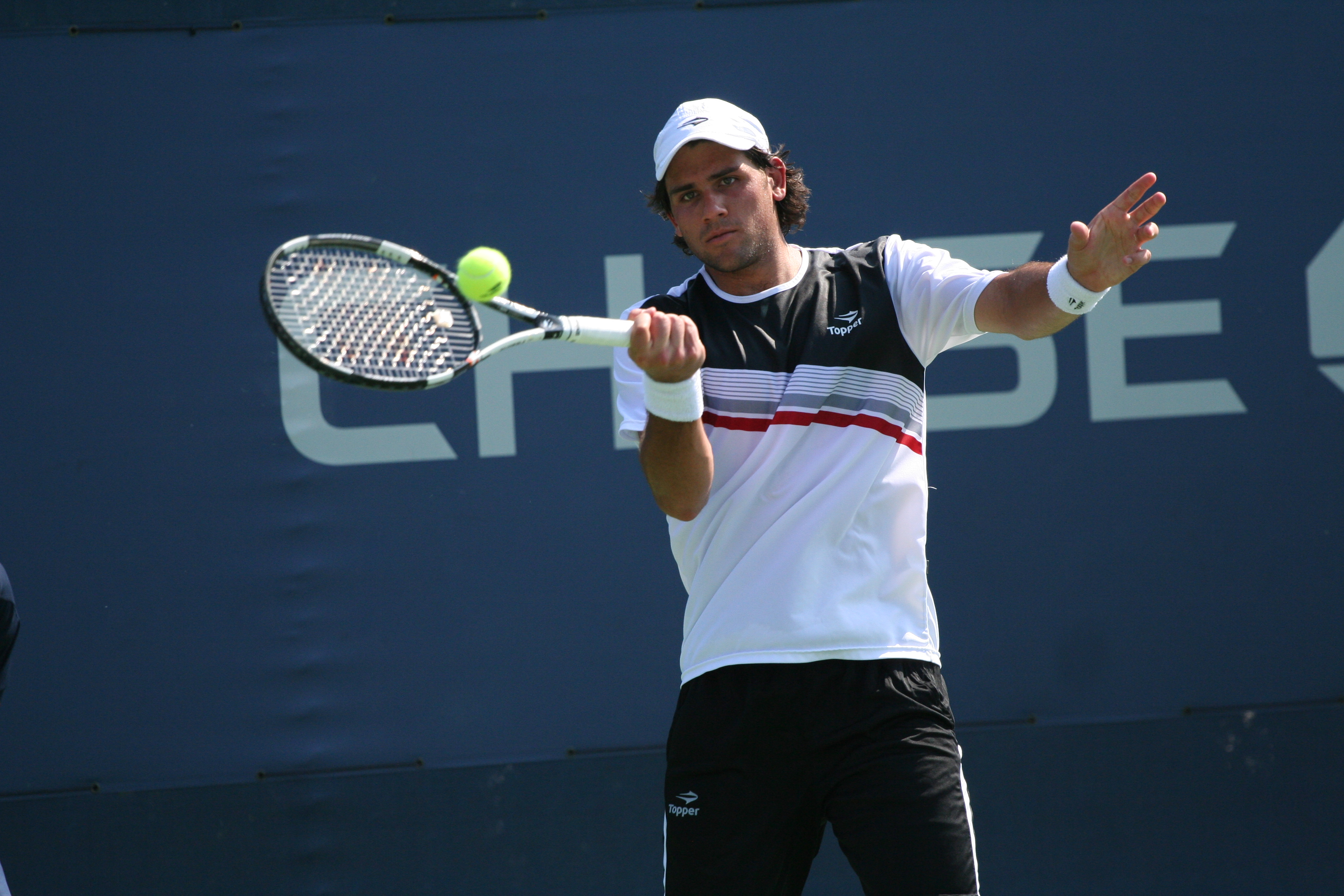 U.S. Open Aug. 31, 2010